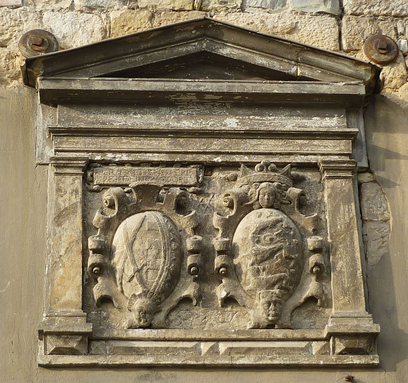 Kurfürstliches Allianzwappen an der ehemaligen Hofmühle (Bienertmühle) in Dresden: Kurfürst August von Sachsen und Kurfürstin Anna geb. Prinzessin von Dänemark